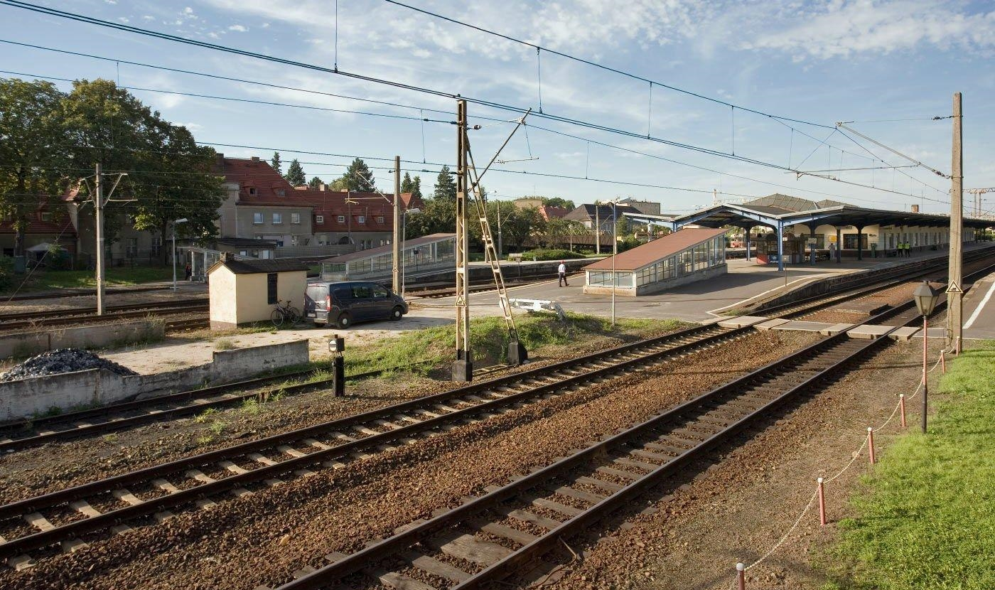 Z lewej strony dworzec, zasłonięty o tej porze roku wysokimi drzewami. Na tym terenie spotkałam, po raz pierwszy w życiu, najprawdziwszych SOKistów. Cała stacja, dworzec, torowiska i panujący Ordnung mocno odstają od tego, co widuję na stacjach w różnych rejonach kraju.